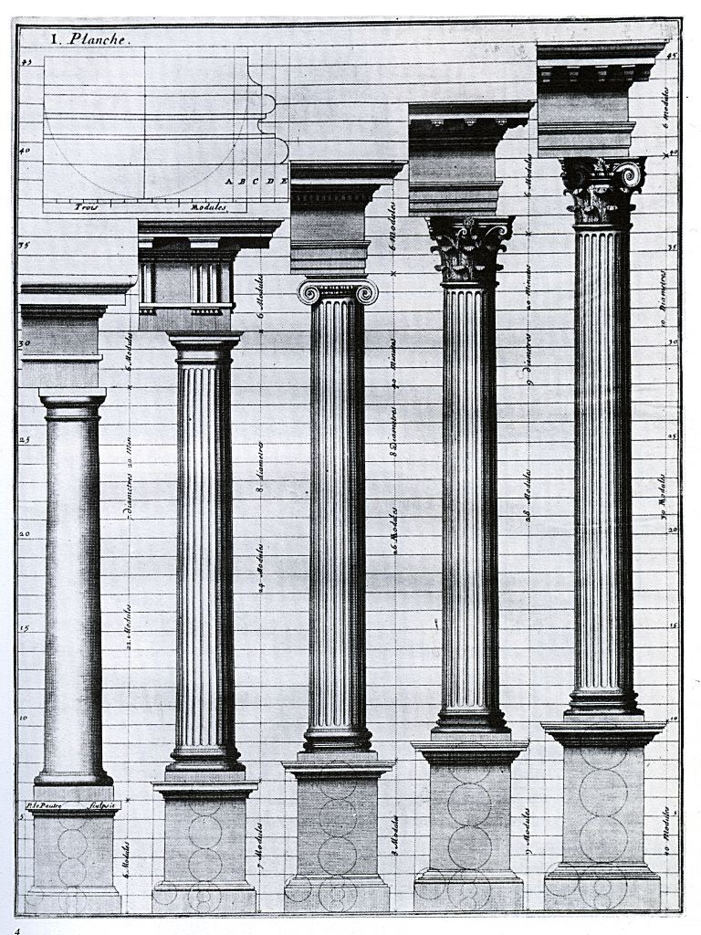 Søyleordener etter Claude Perrault 1676.